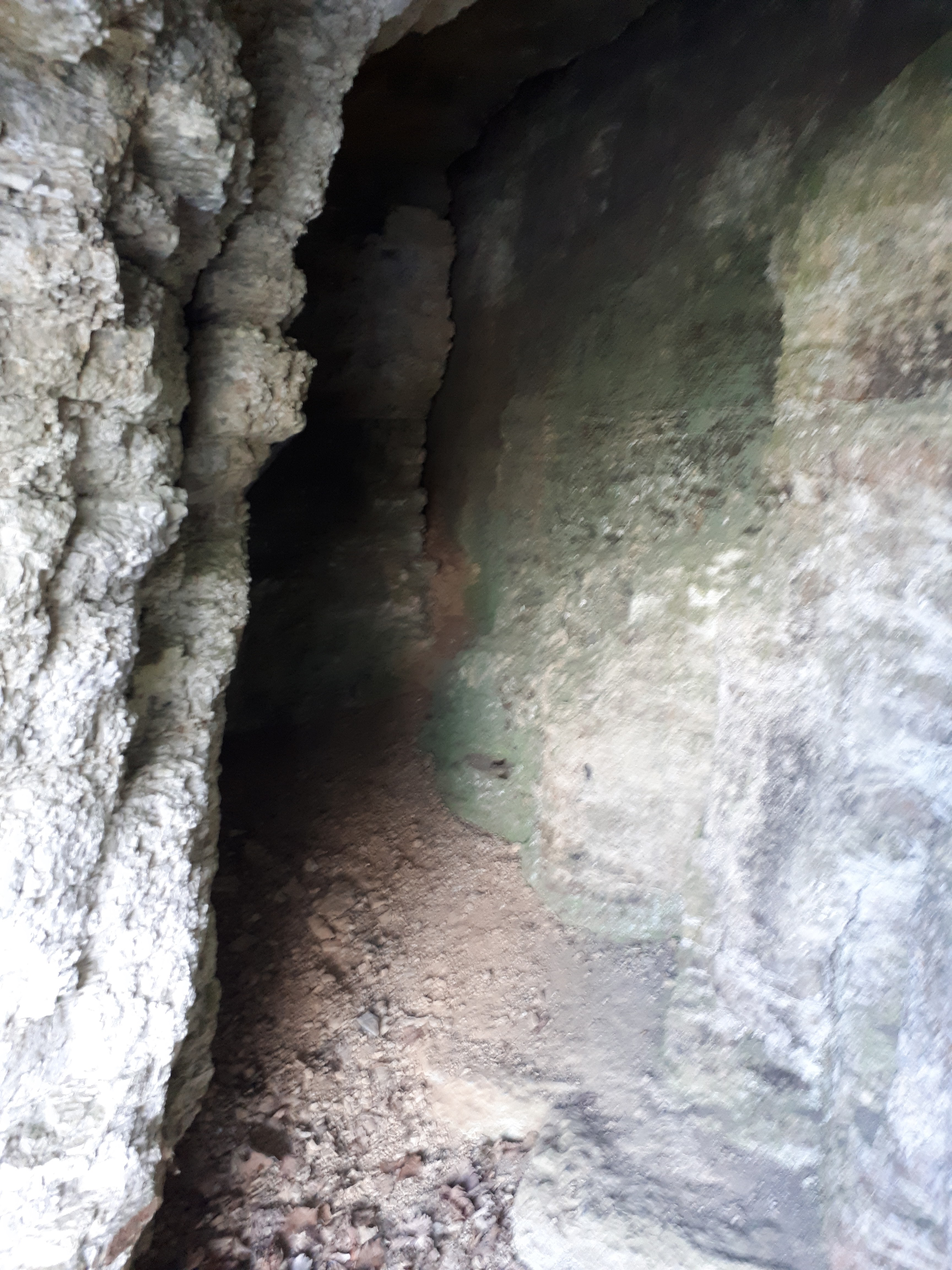 Einsicht in die Höhle der Notburga